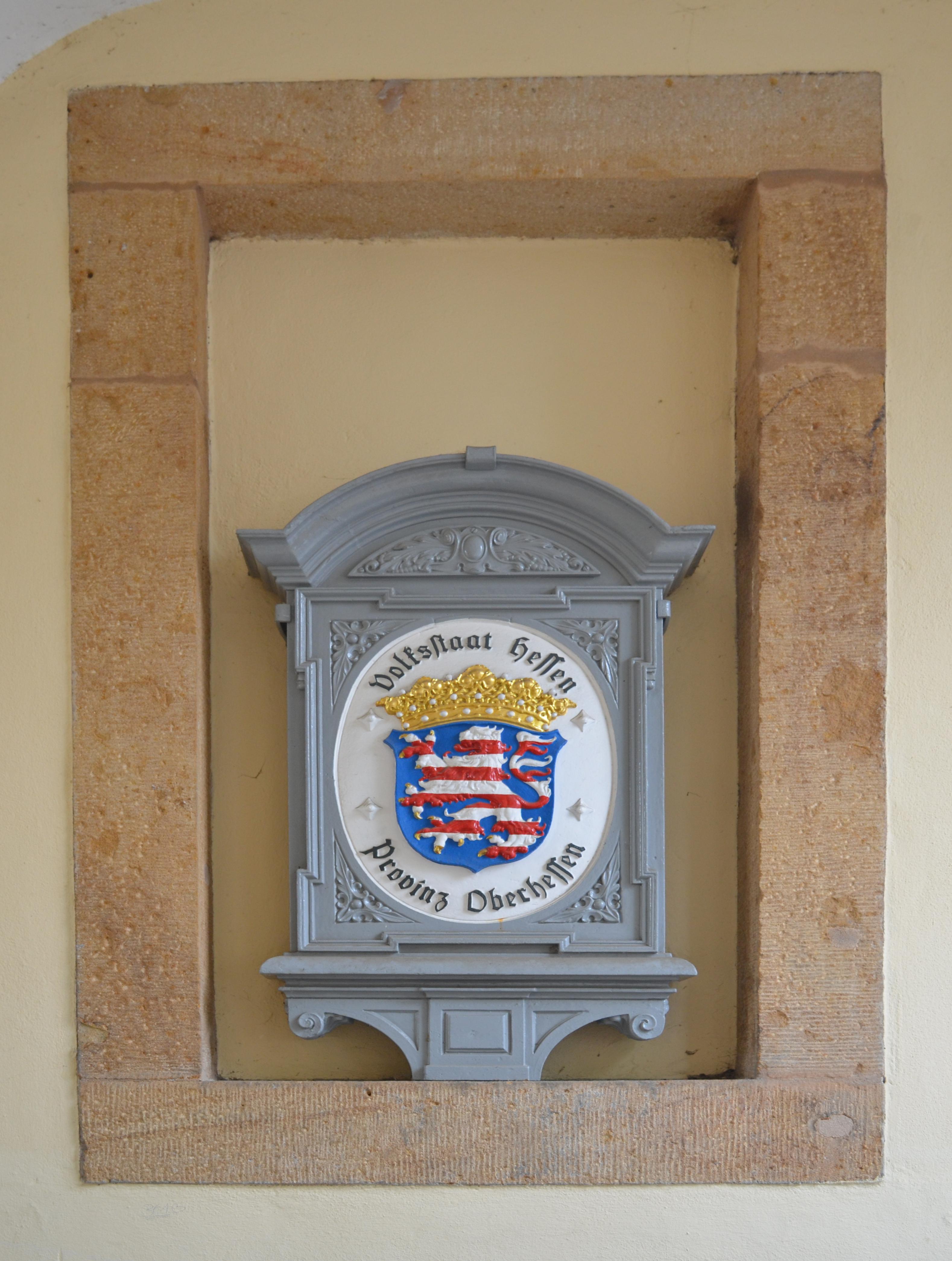 Lauterbach, Palais Hohhaus, Wappen Volksstaat Hessen